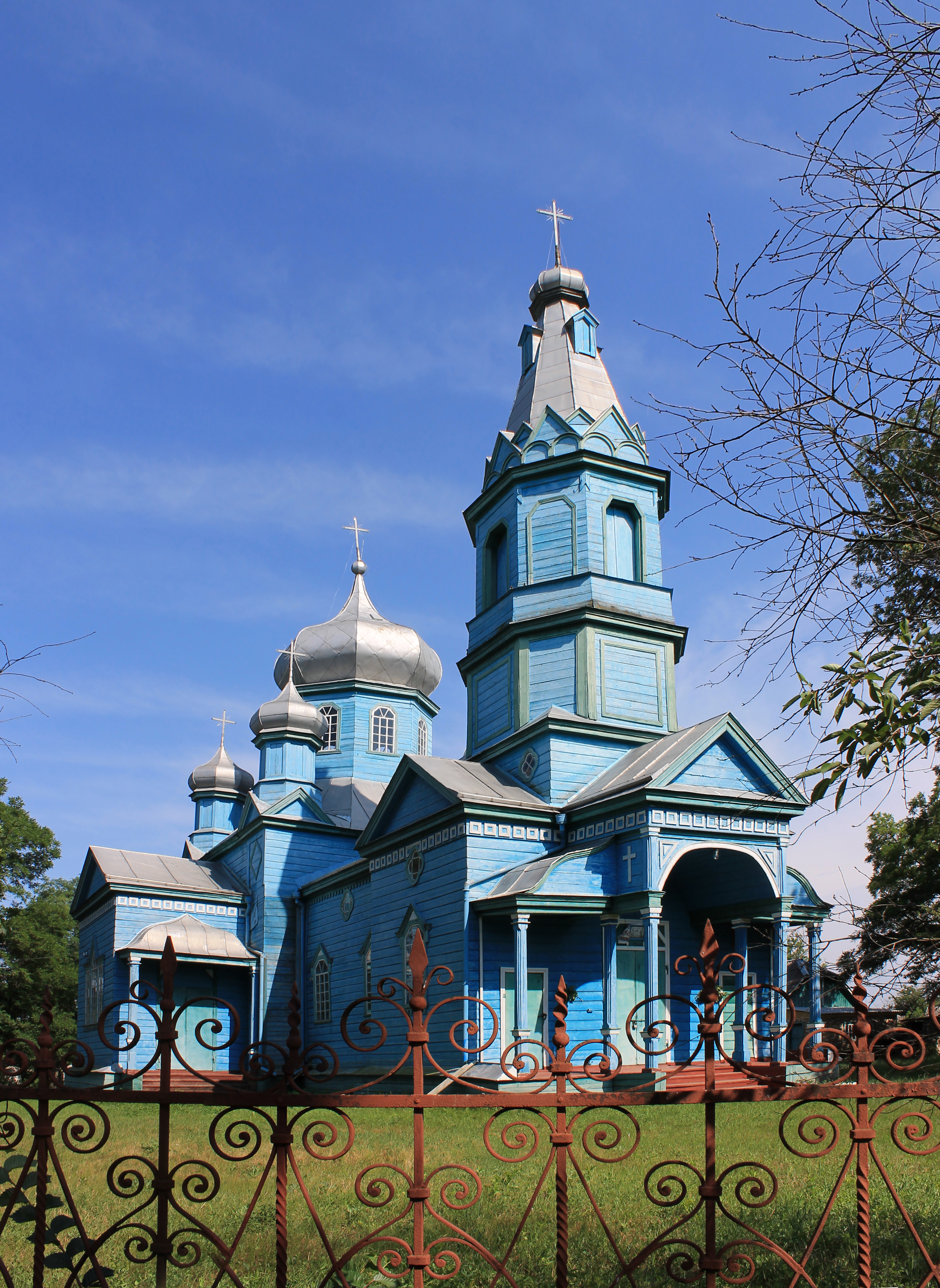 Церква Успiння Богородицi 1851р., с.Жаботин, Кам'янський р-н., Черкаська обл.